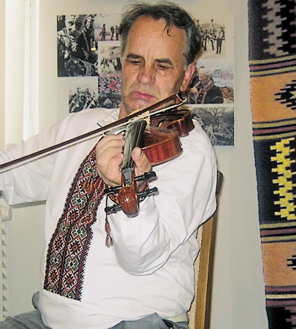 Василь Мартищук - скрипковий майстер, сам випробовує власноруч зроблені інструменти